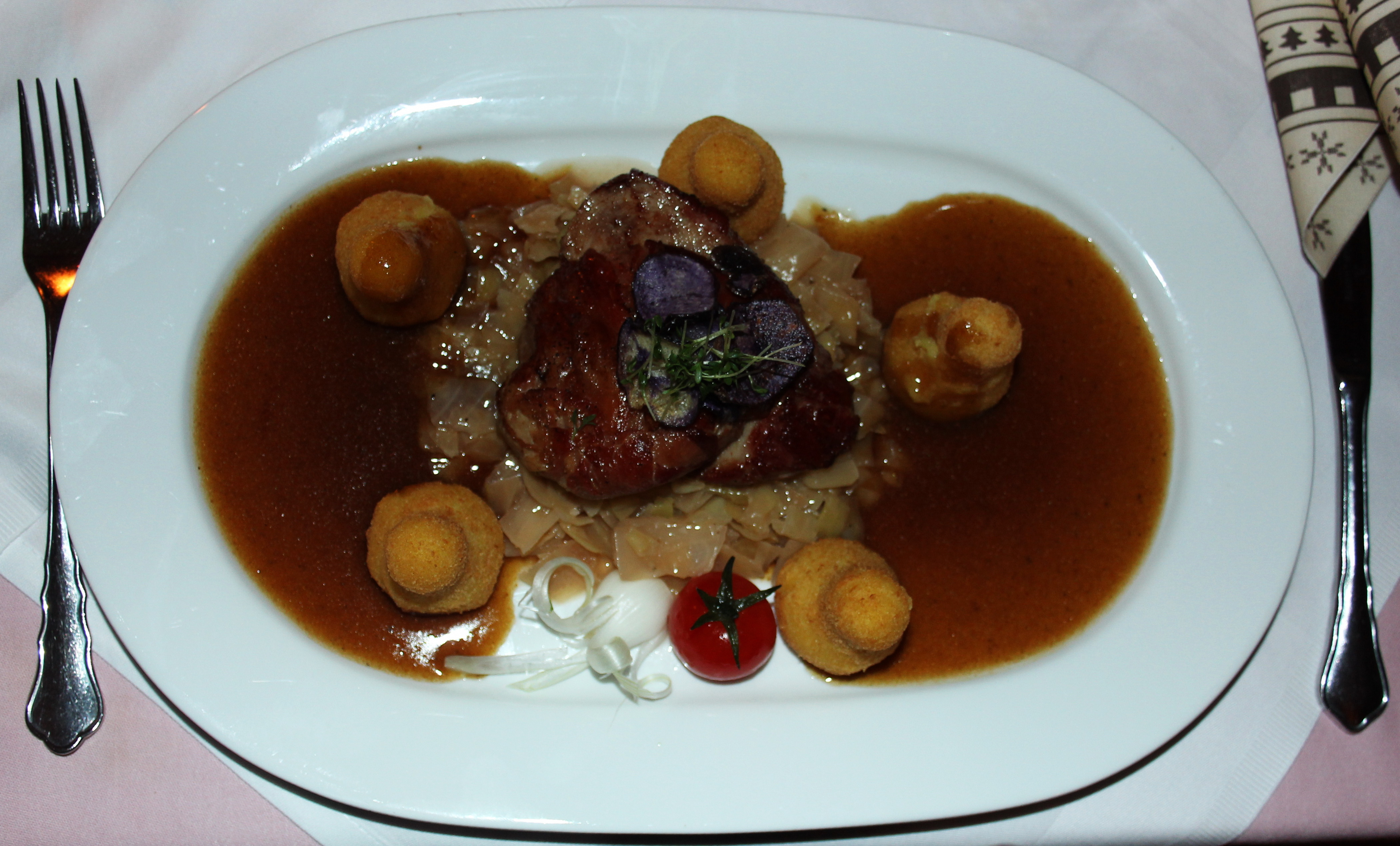 Fasanenbrust im Seranoschinkenmantel mit Kroketten auf Champagnerkraut.